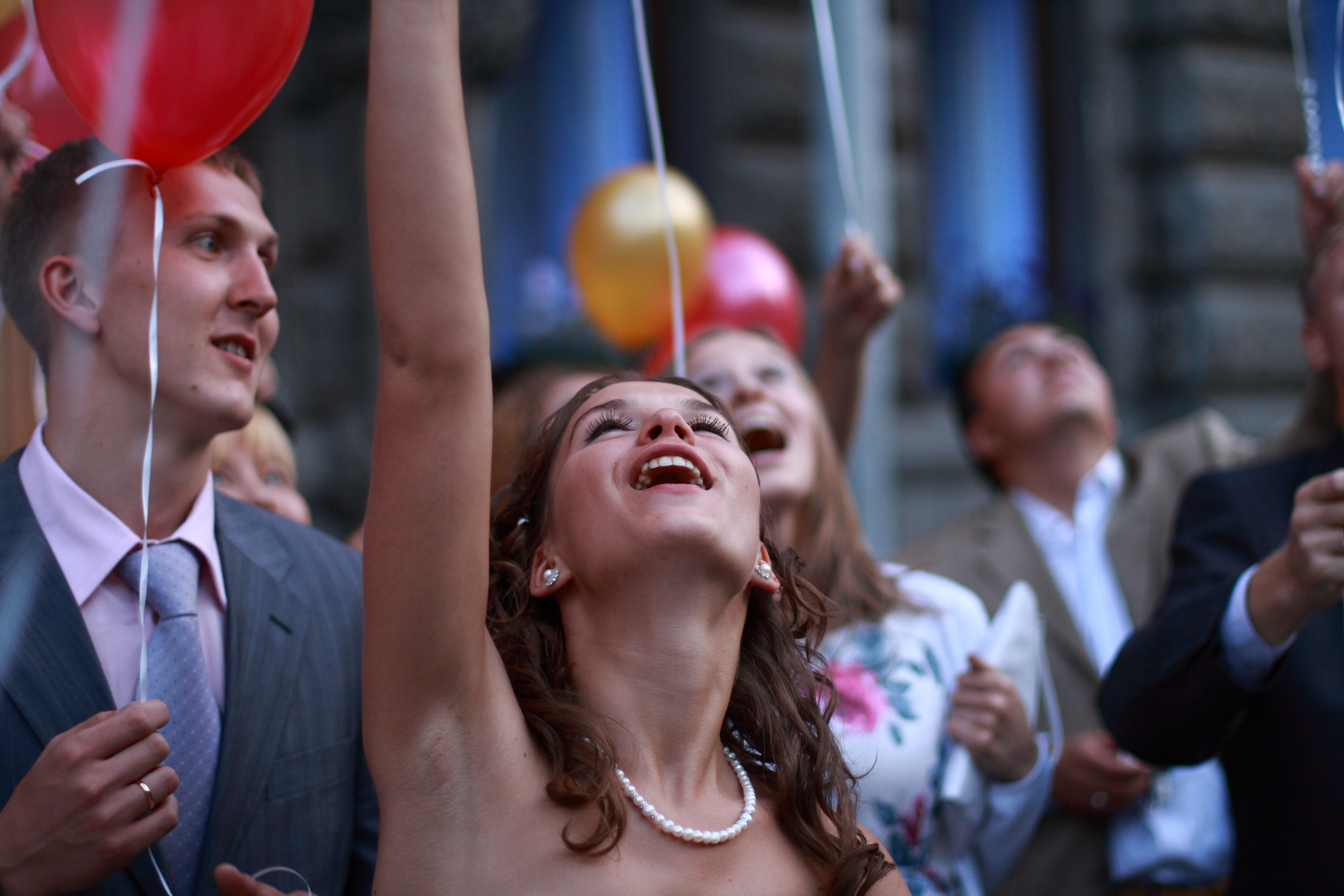 02 x10K_ IMG_3743